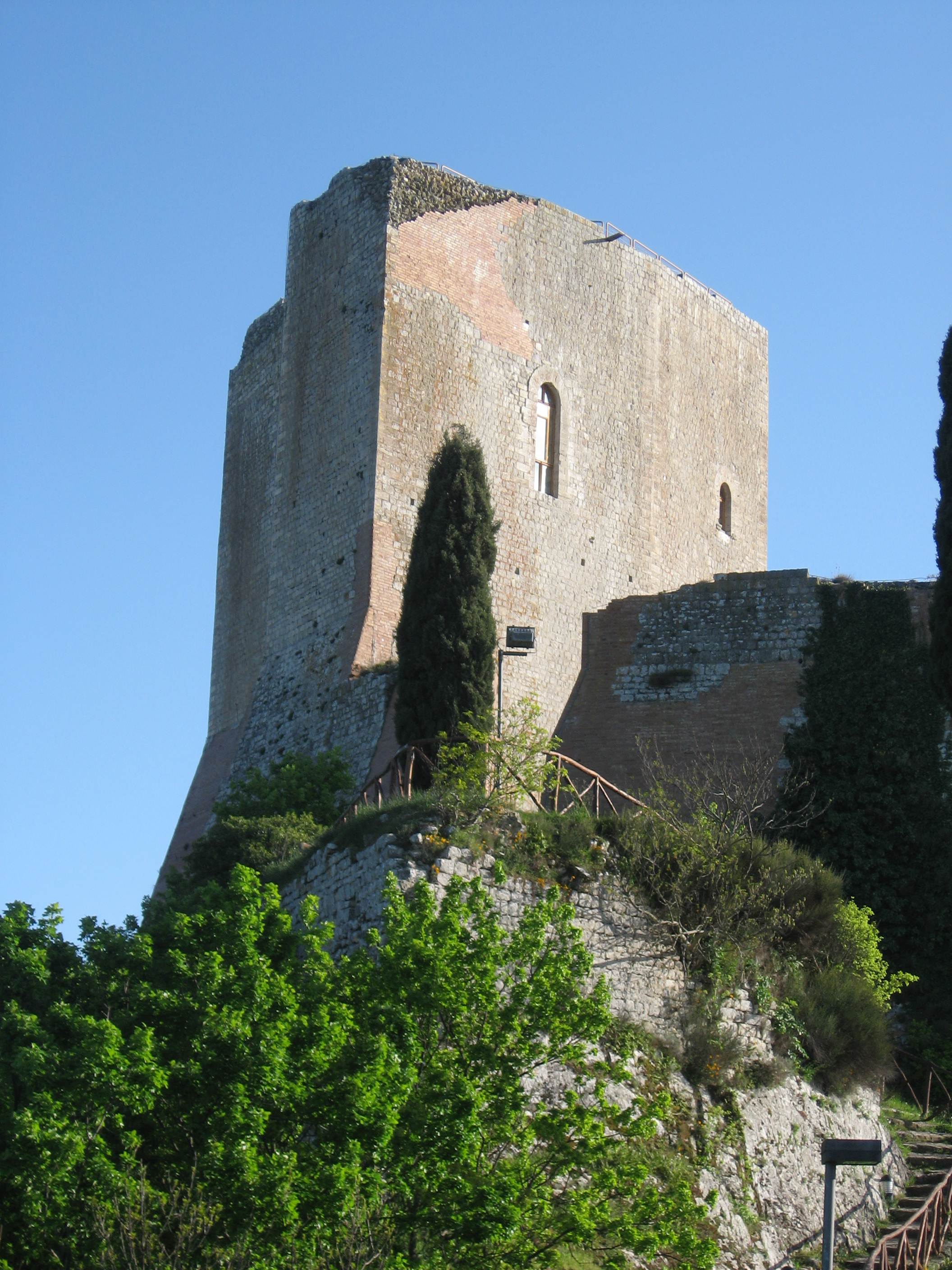 Wikimangia 2008